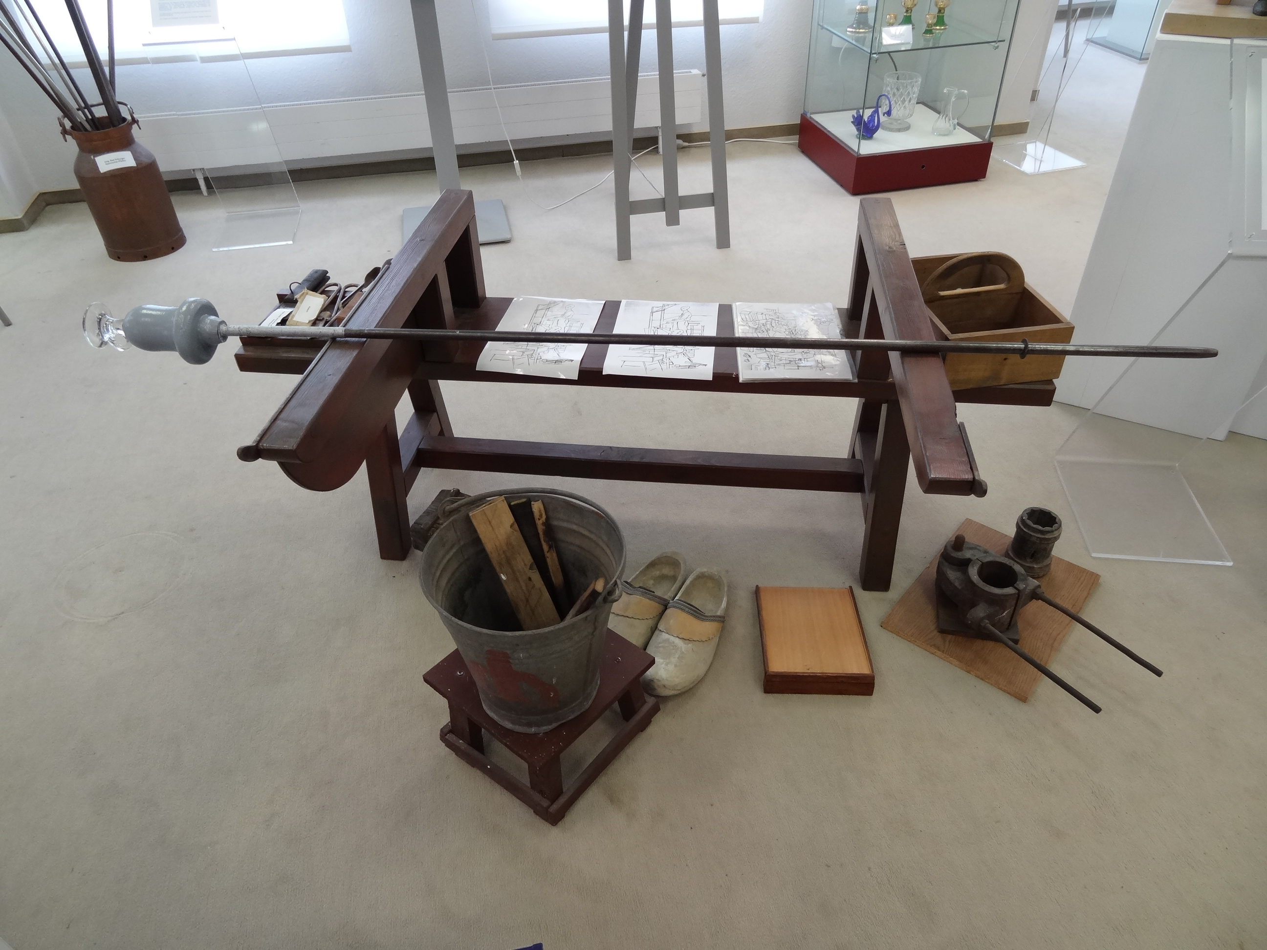 Glasmuseum Bad DriburgThis is a photograph of an architectural monument., no. A 47